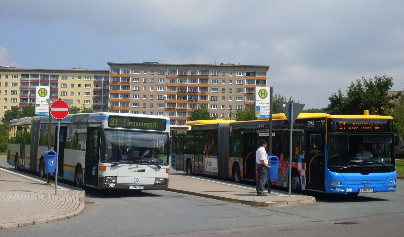 Buswendeschleife - Fürstenstraße, Yorkgebiet